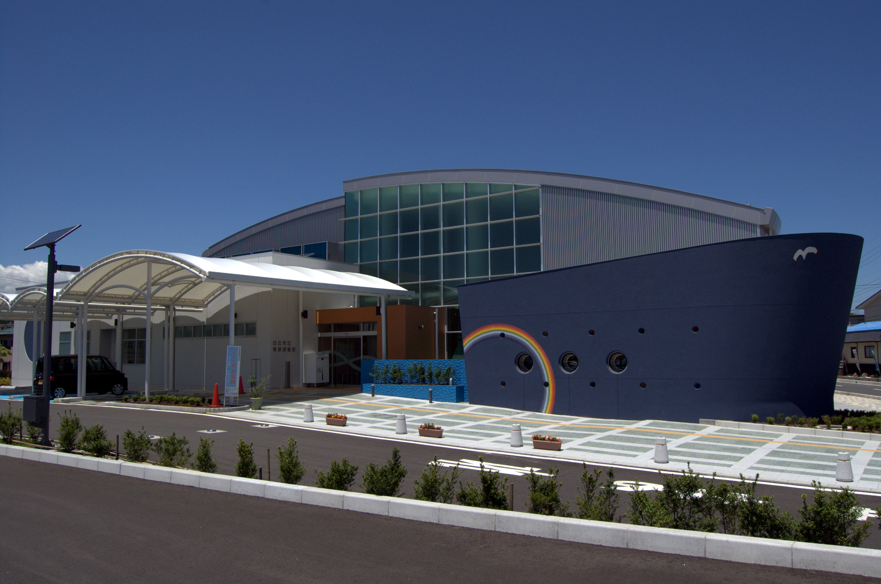 日立市南部図書館